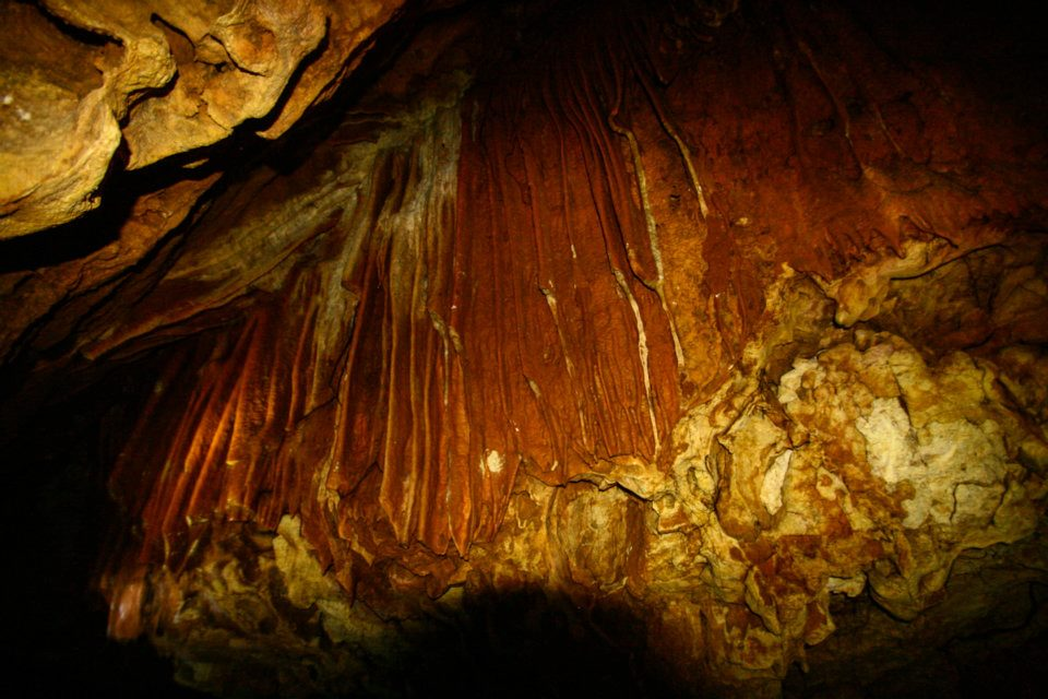 صواعد كهوف في مغارة بغابات برقش.